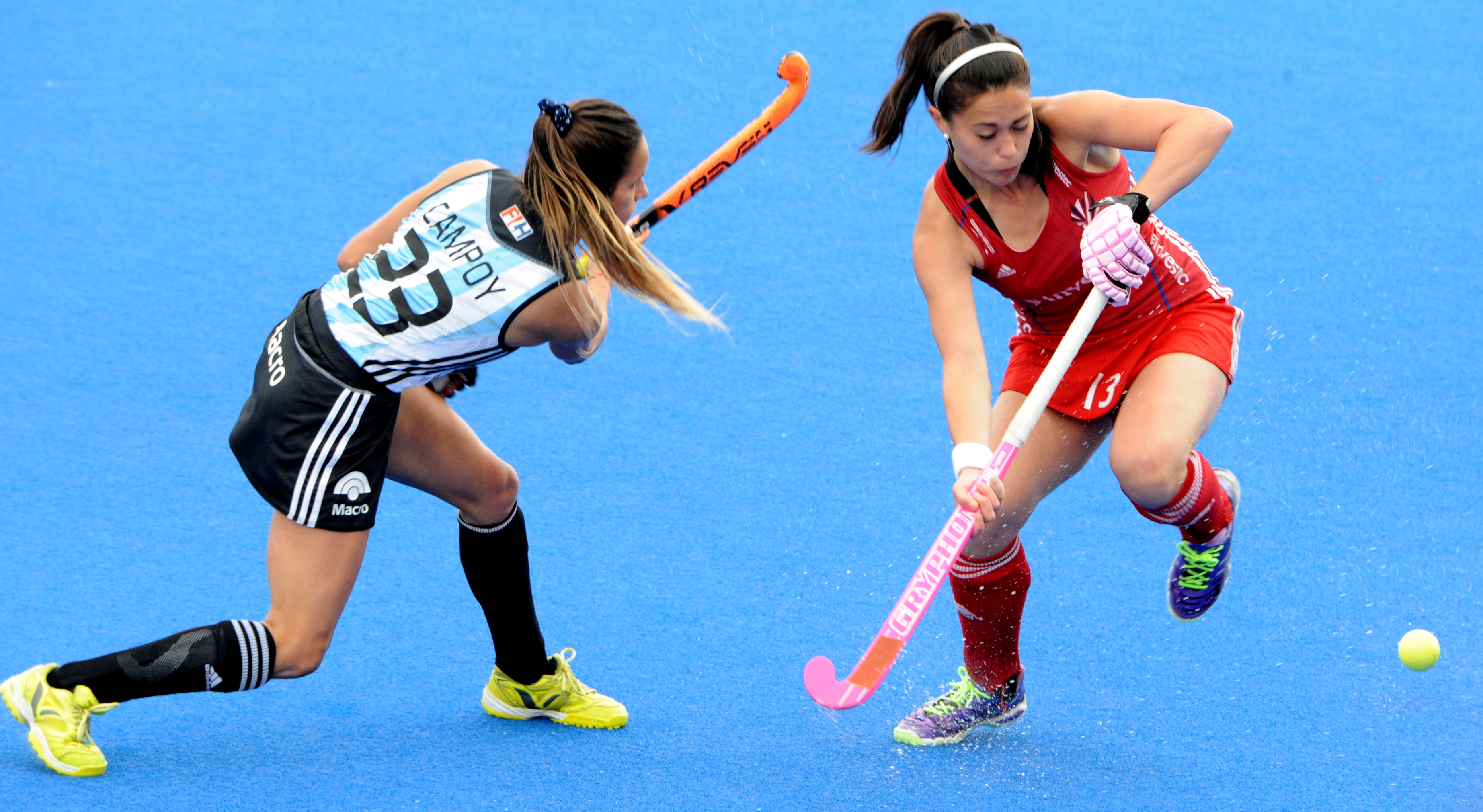 23 : Pilar Campoy